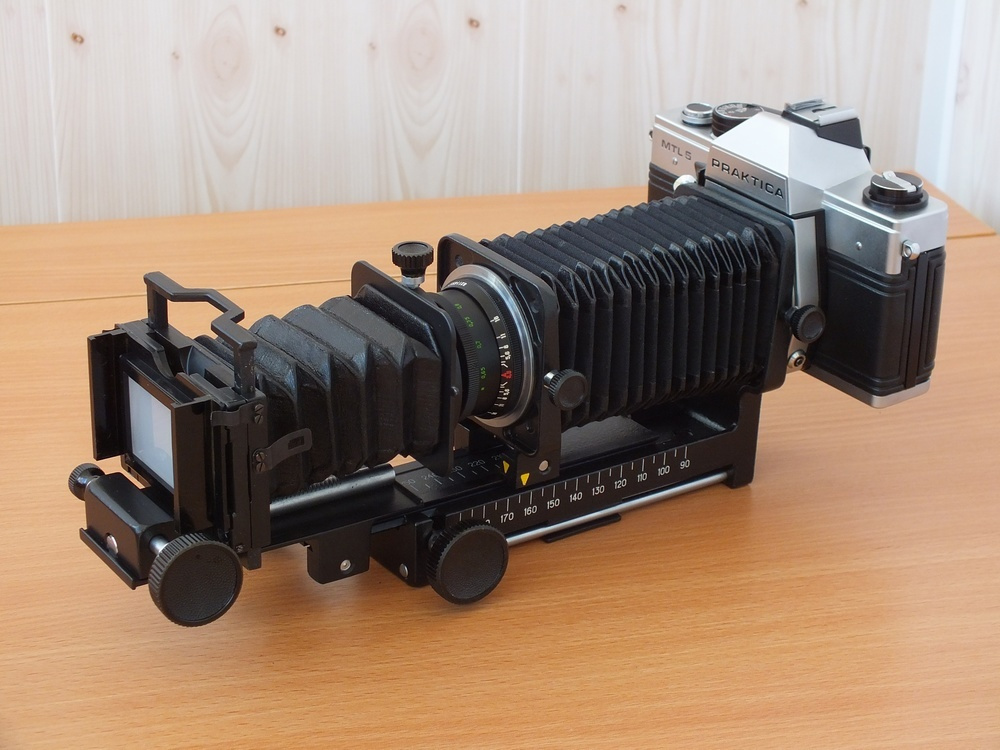 Устройство состоит из зеркального фотоаппарата и приставок ПЗФ и ПД и позволяет сделать фотографии из цветных слайдов формата 24х36 мм.